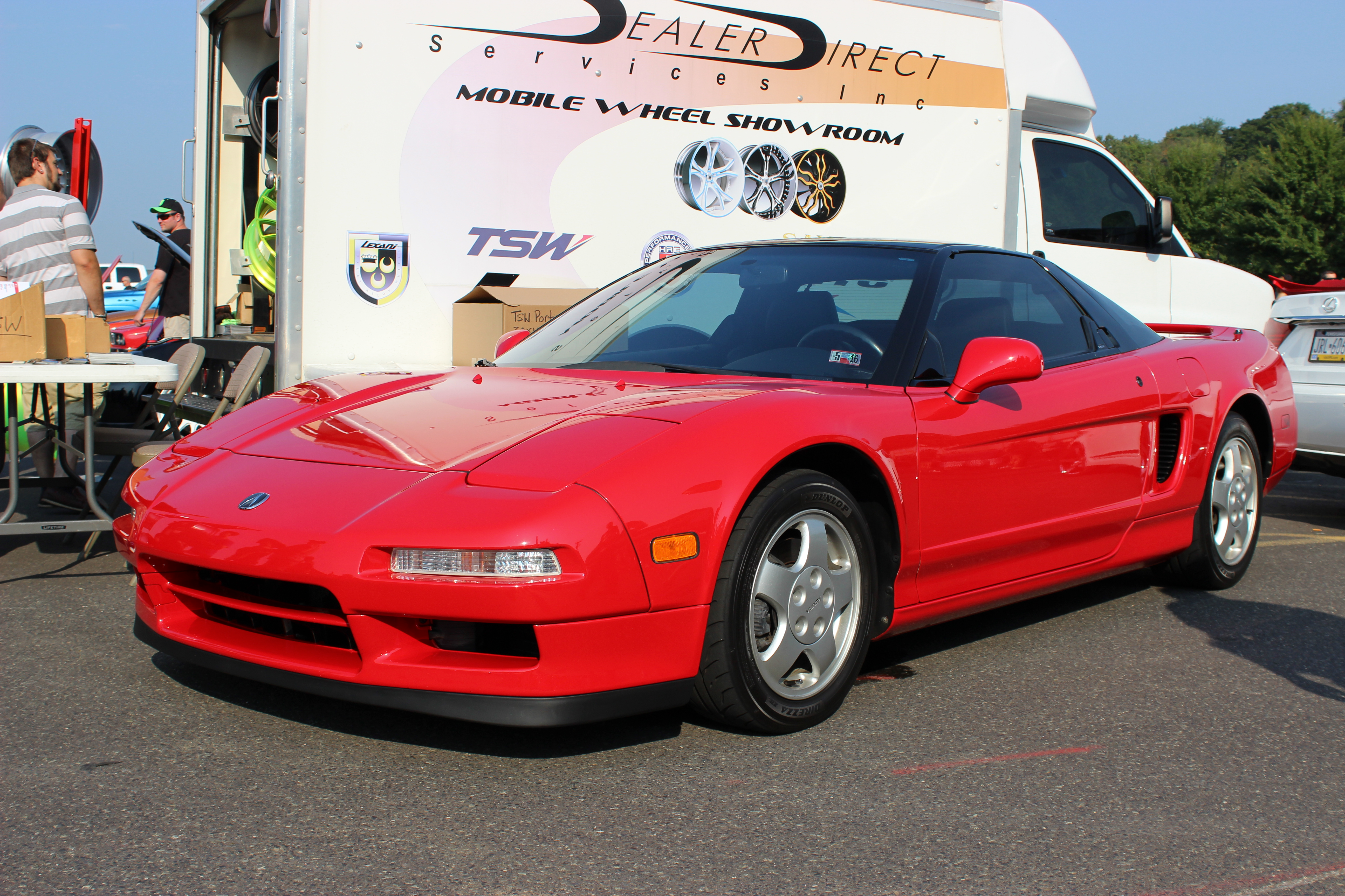 Acura NSX